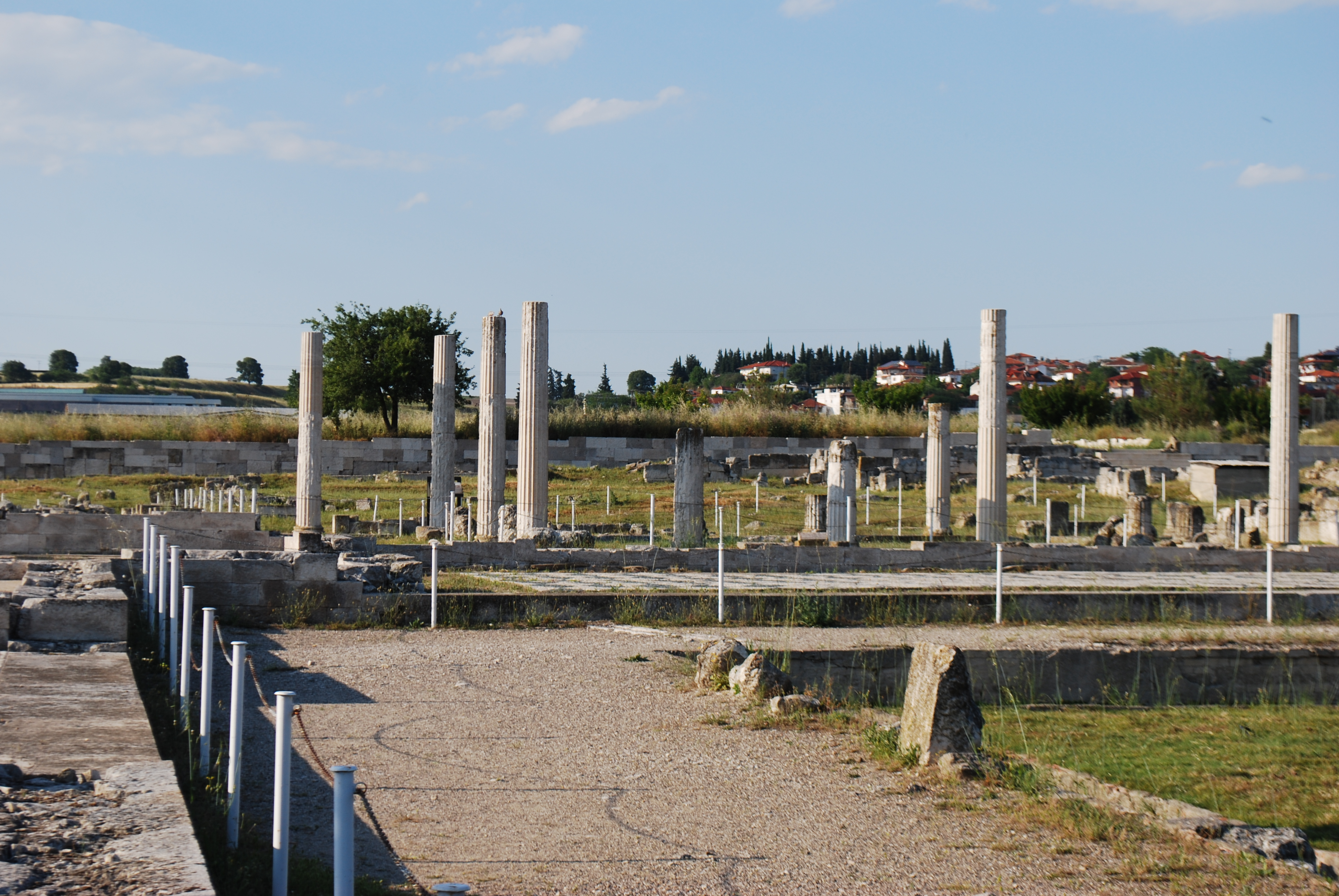 Vue du site archéologique de Pella, capitale du royaume de Macédoine à l'époque d'Alexandre le Grand.